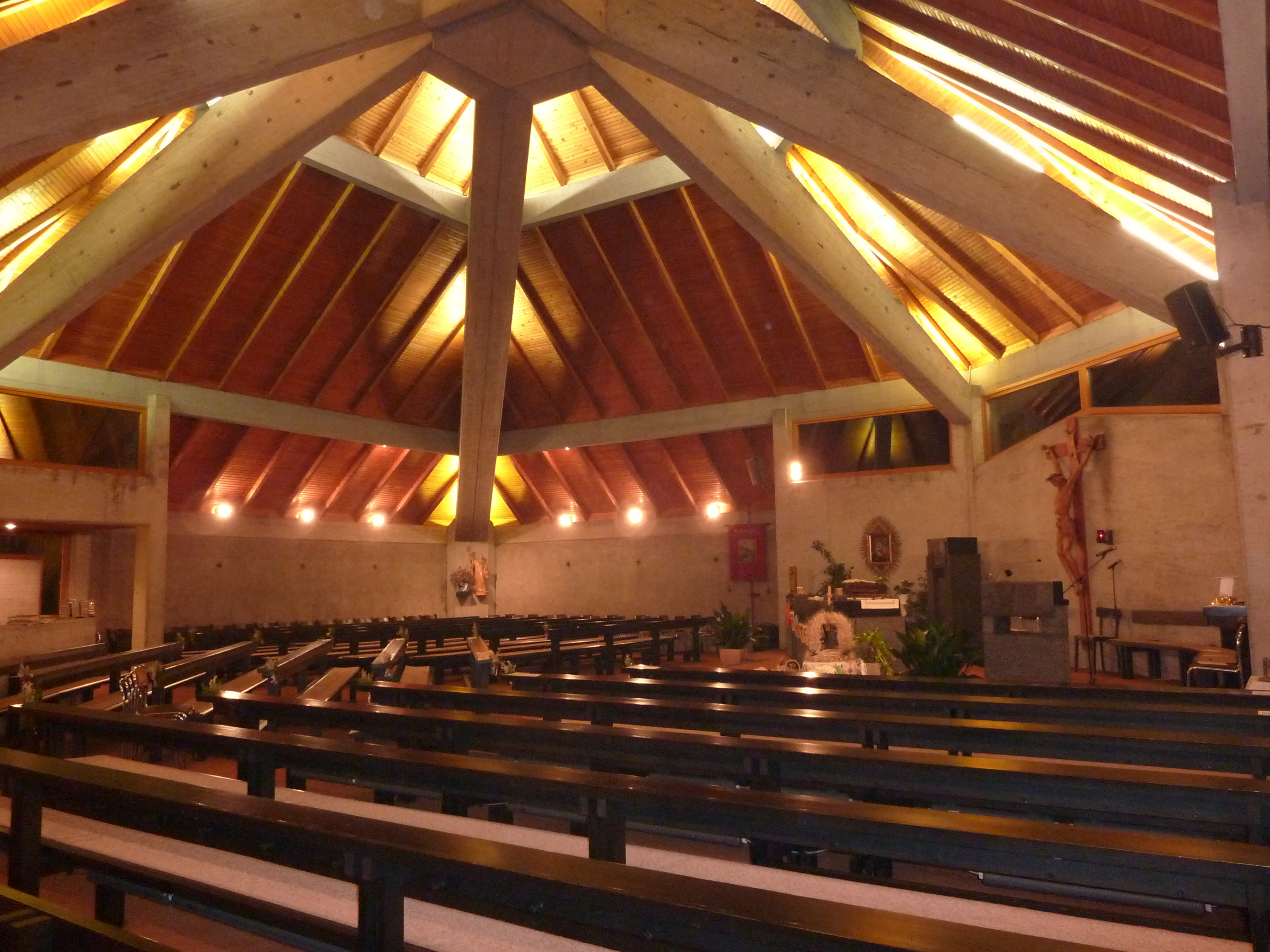 Pfarrkirche Mariae Aufnahme in den Himmel in Jetzeldorf, Haugsdorf, Niederösterreich